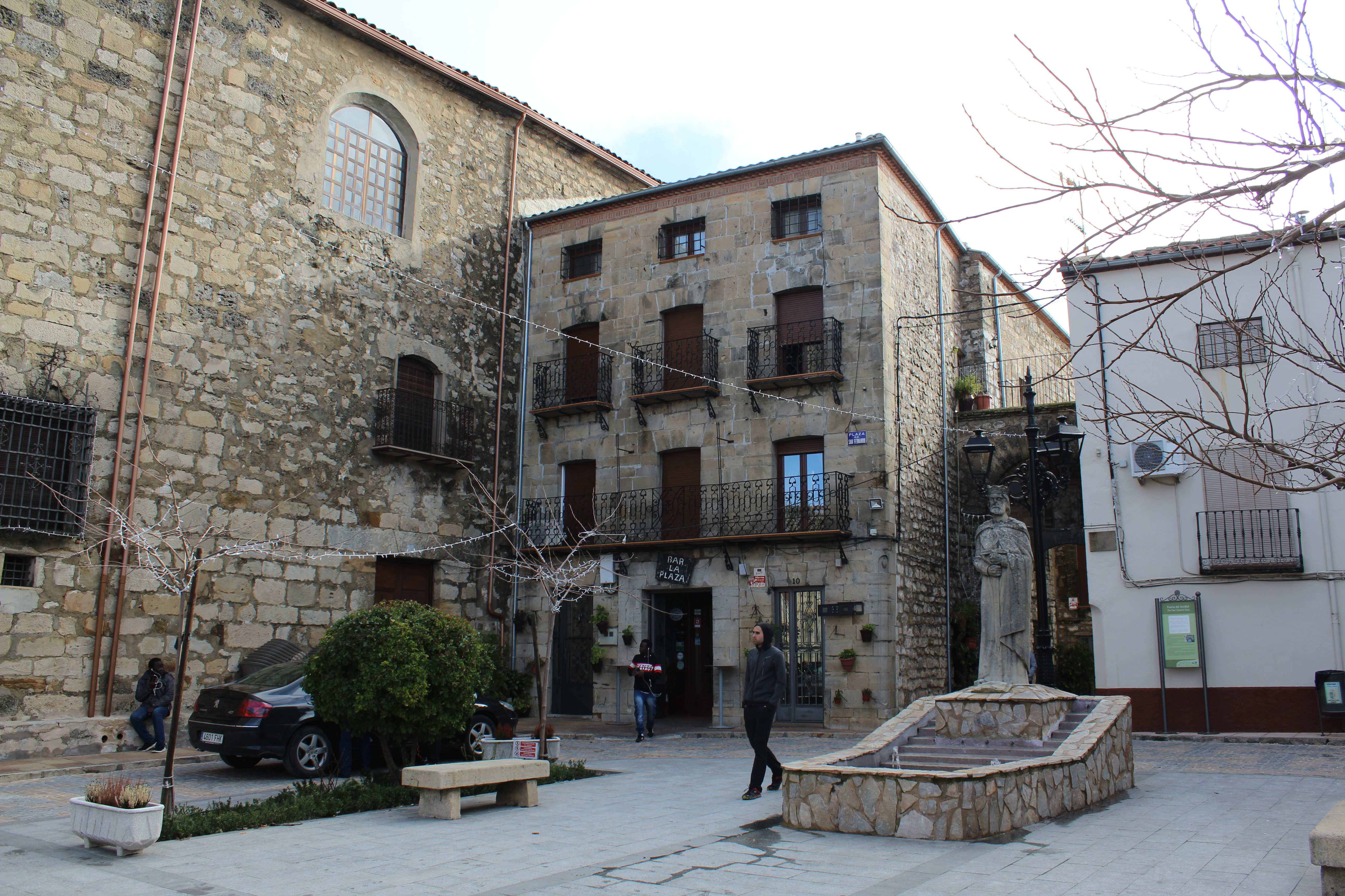 Plaza de San Fernando, con escultura de Fernando III el Santo, que conquistó Iznatoraf de manos de los árabes en el siglo XIII.